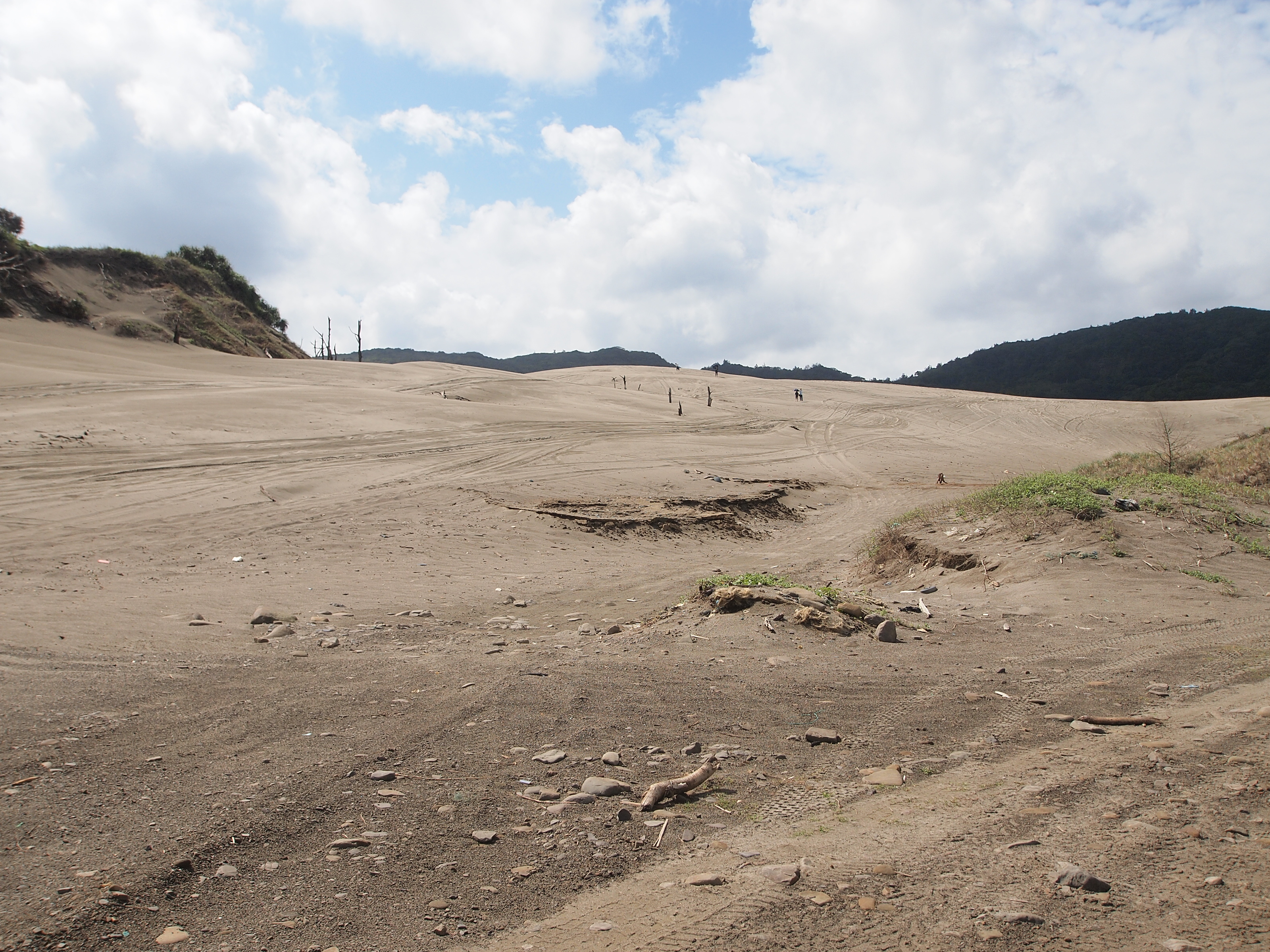 九棚沙漠 - Jiupeng Desert - 2012.02